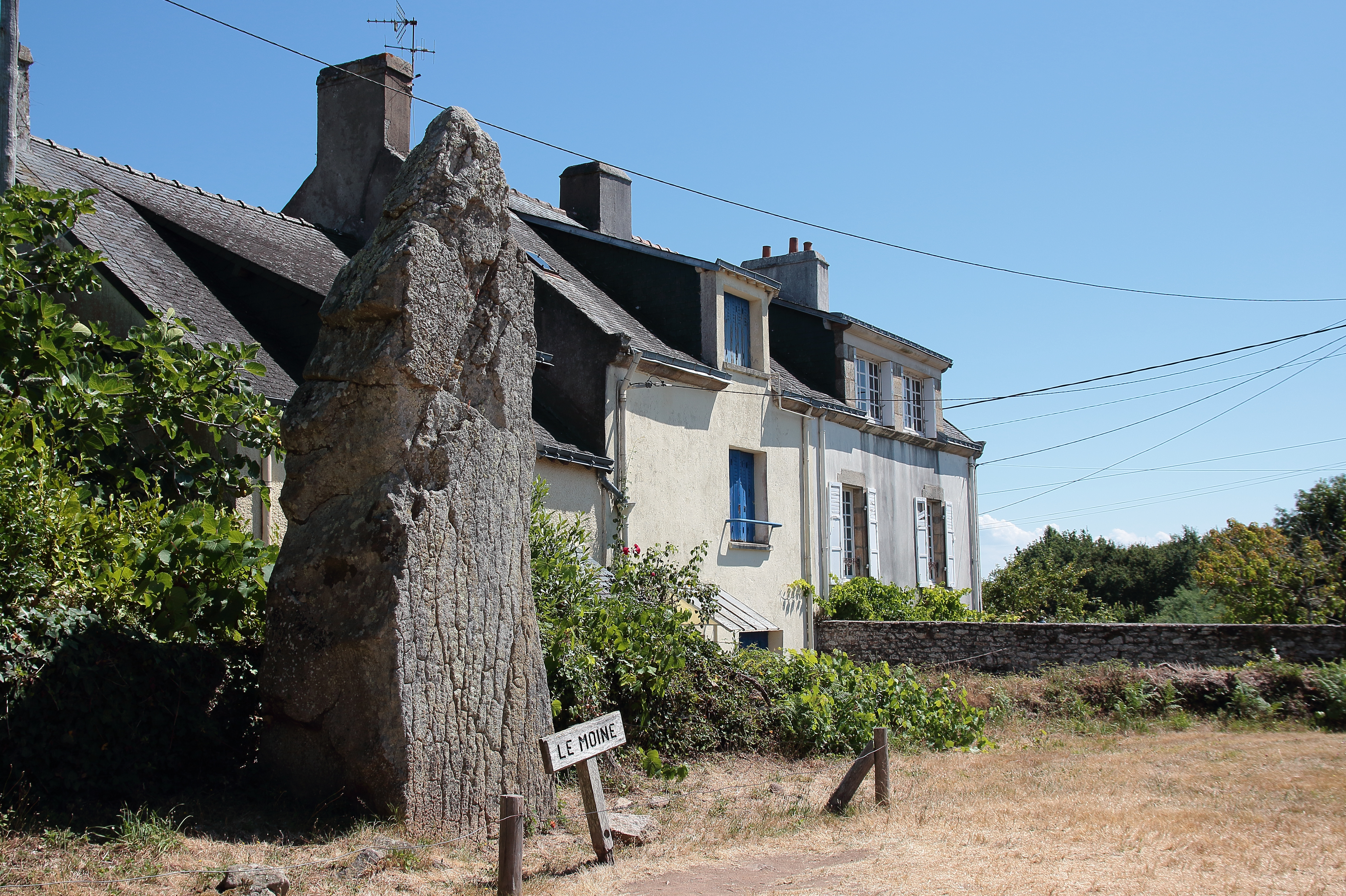 "Le Moine" - der Mönch; der größte Menhir des Steinkreises "Cromlech de Kergonan" auf der Île aux Moines, Golf du Morbihan, Bretagne